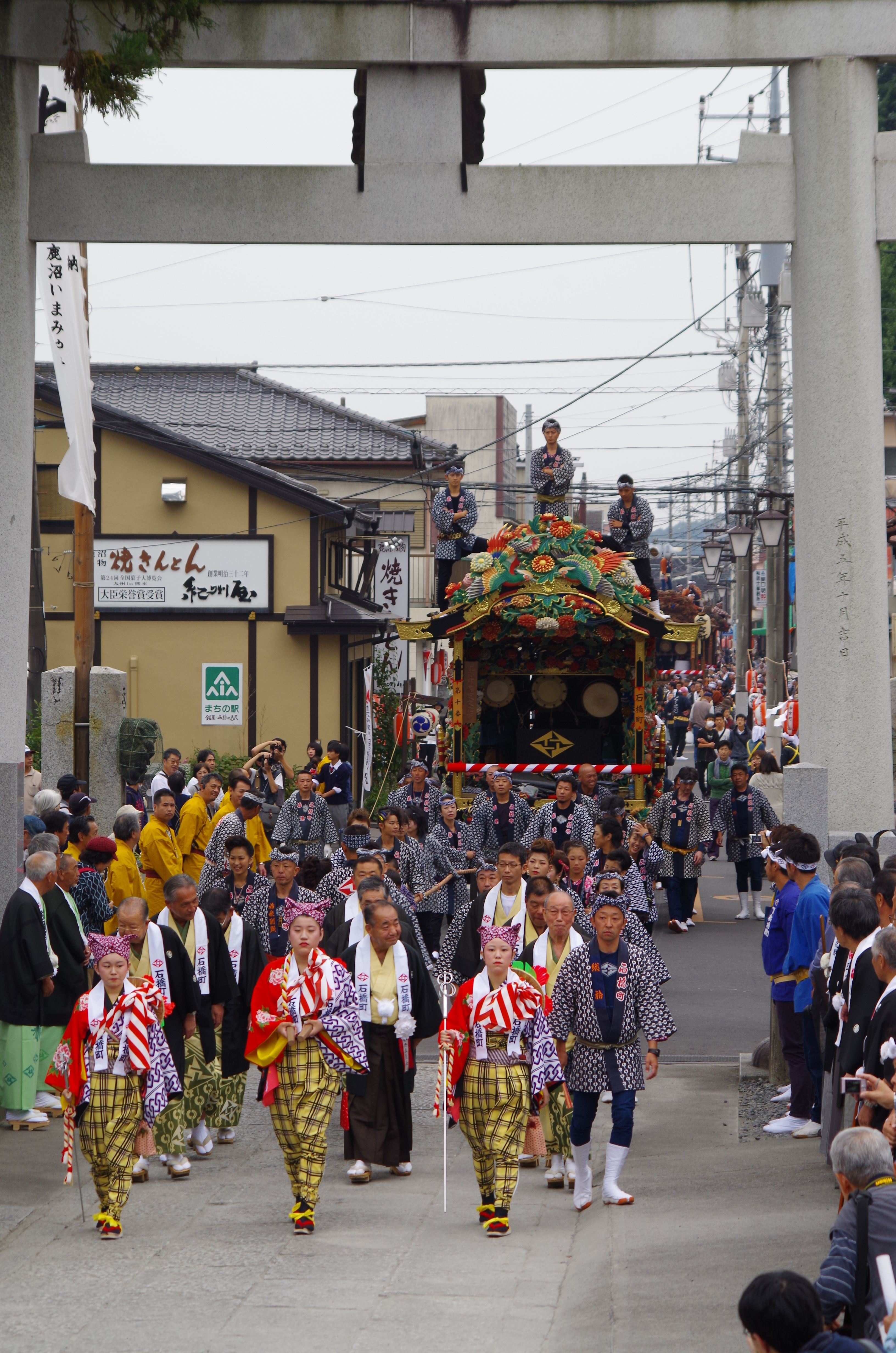 鹿沼今宮神社祭の屋台行事繰り込み